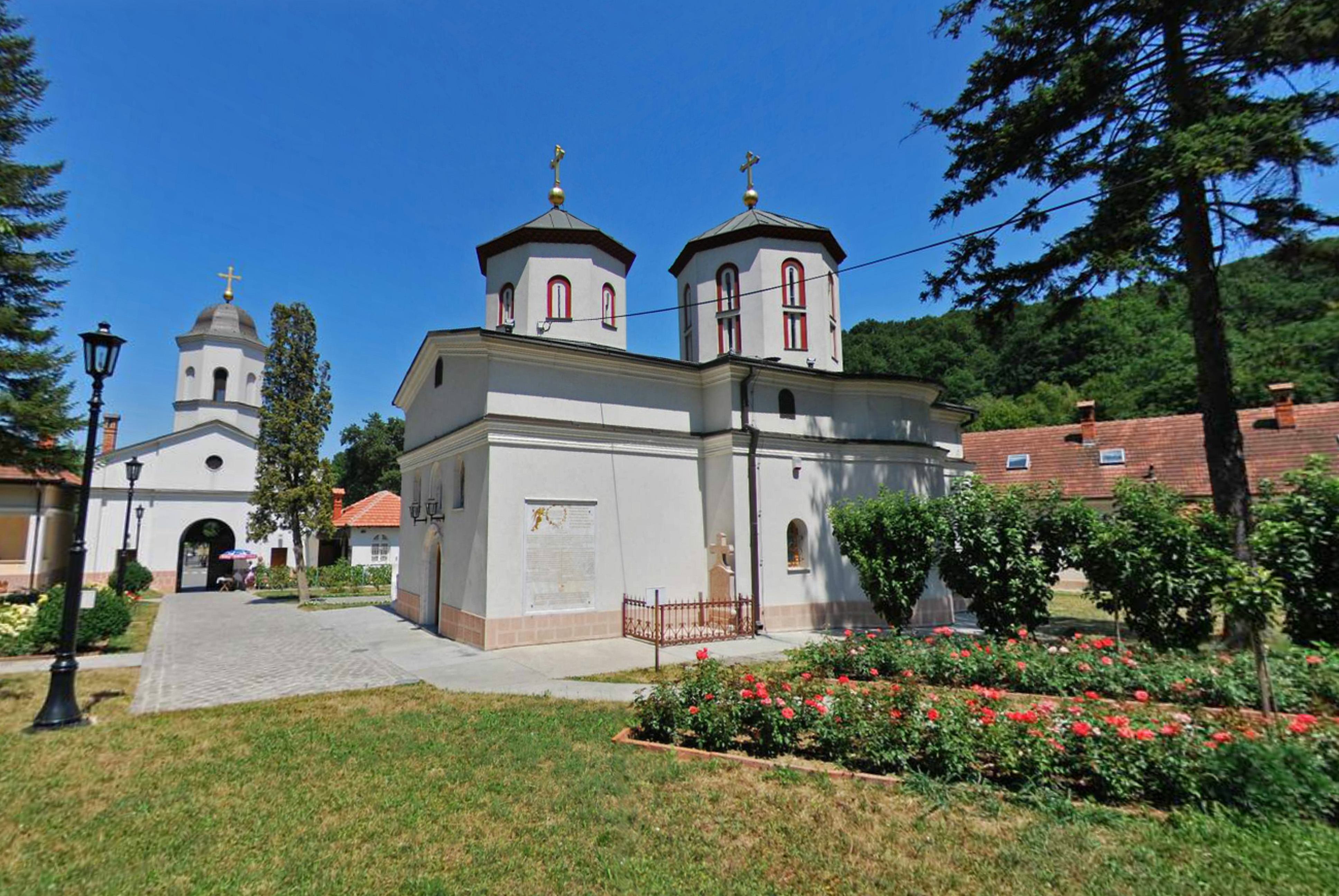 Манасир Раковица на периферији Београда